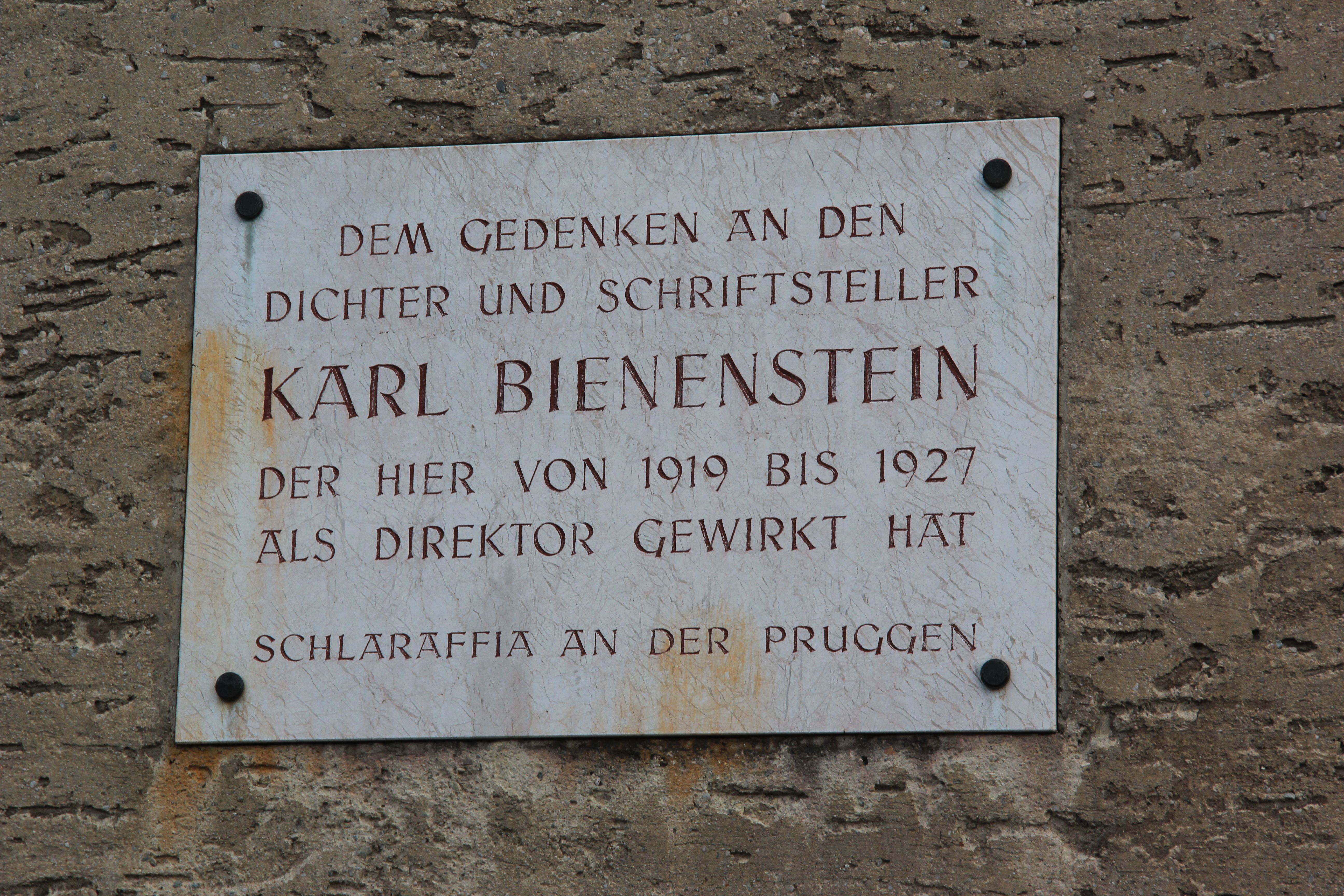 Wandtafel für Karl Bienenstein in Bruck an der Mur